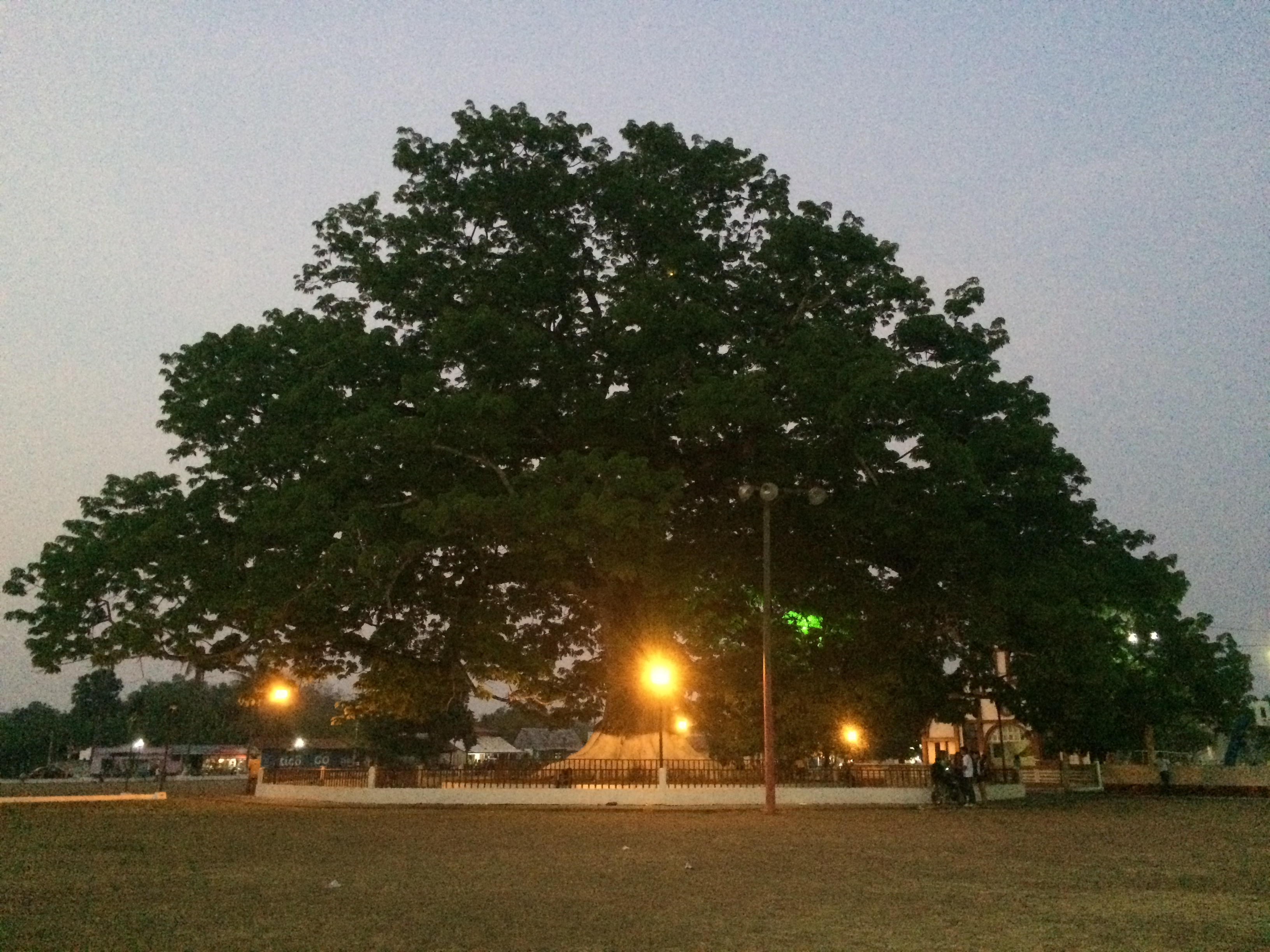 atardecer